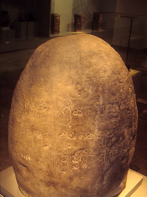 Saya pembuat foto ini melepaskan lisensinya menjadi Domain umum.Bkusmono 05:55, 16 Juli 2007 (UTC)